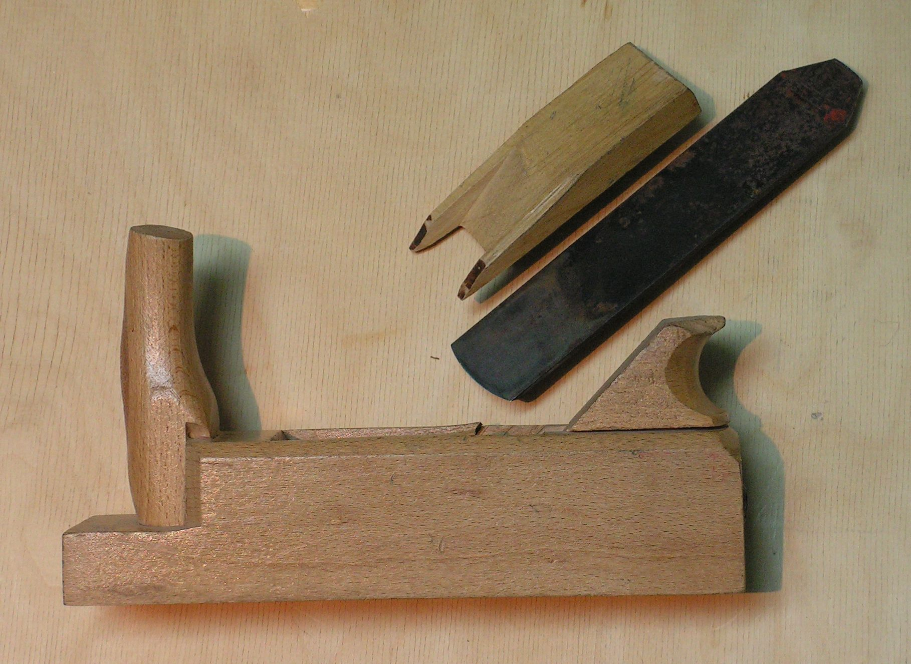 Strug zdzierak. Widoczne części struga: korpus, ostrze, klin.